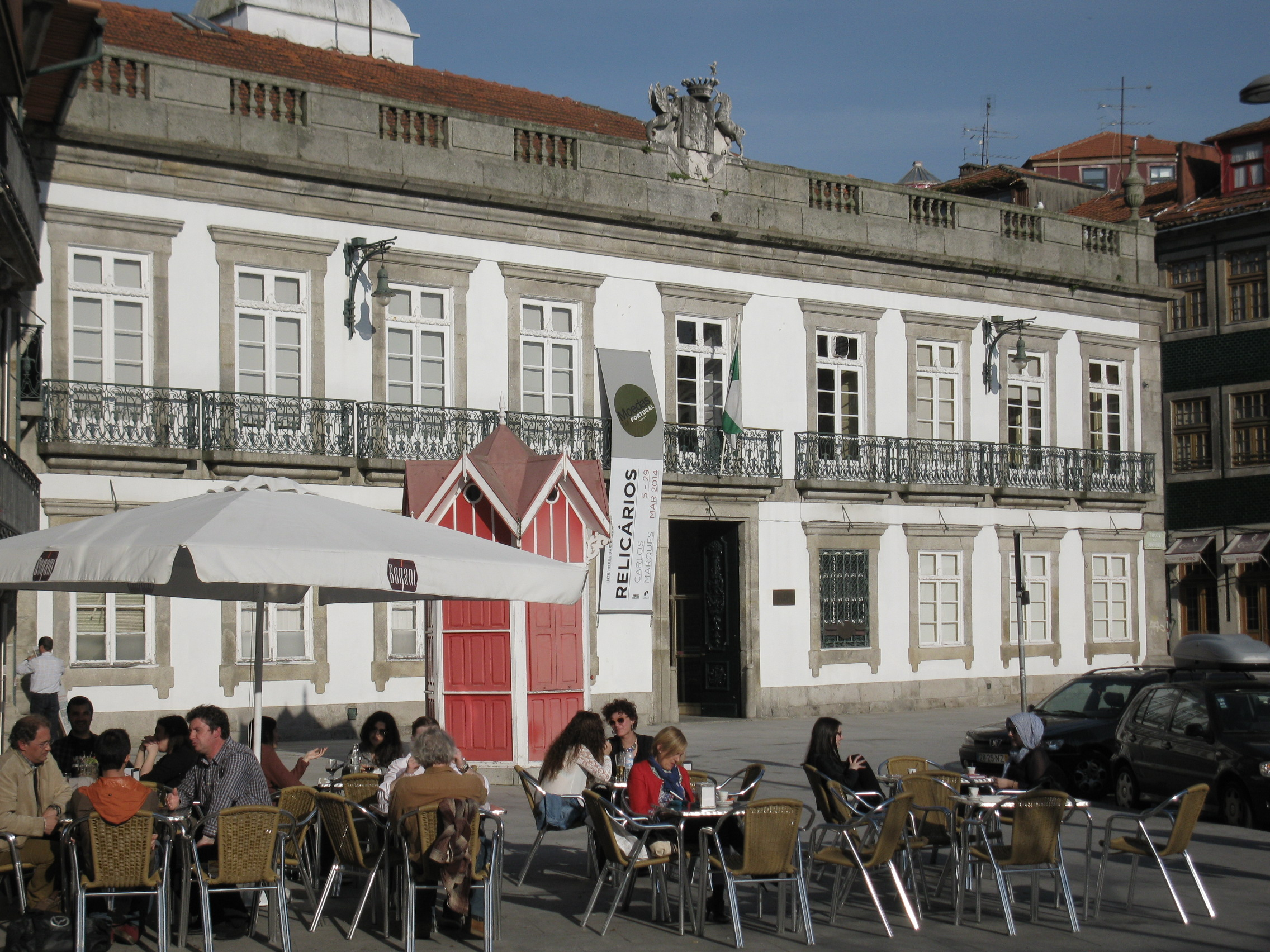 Portugal